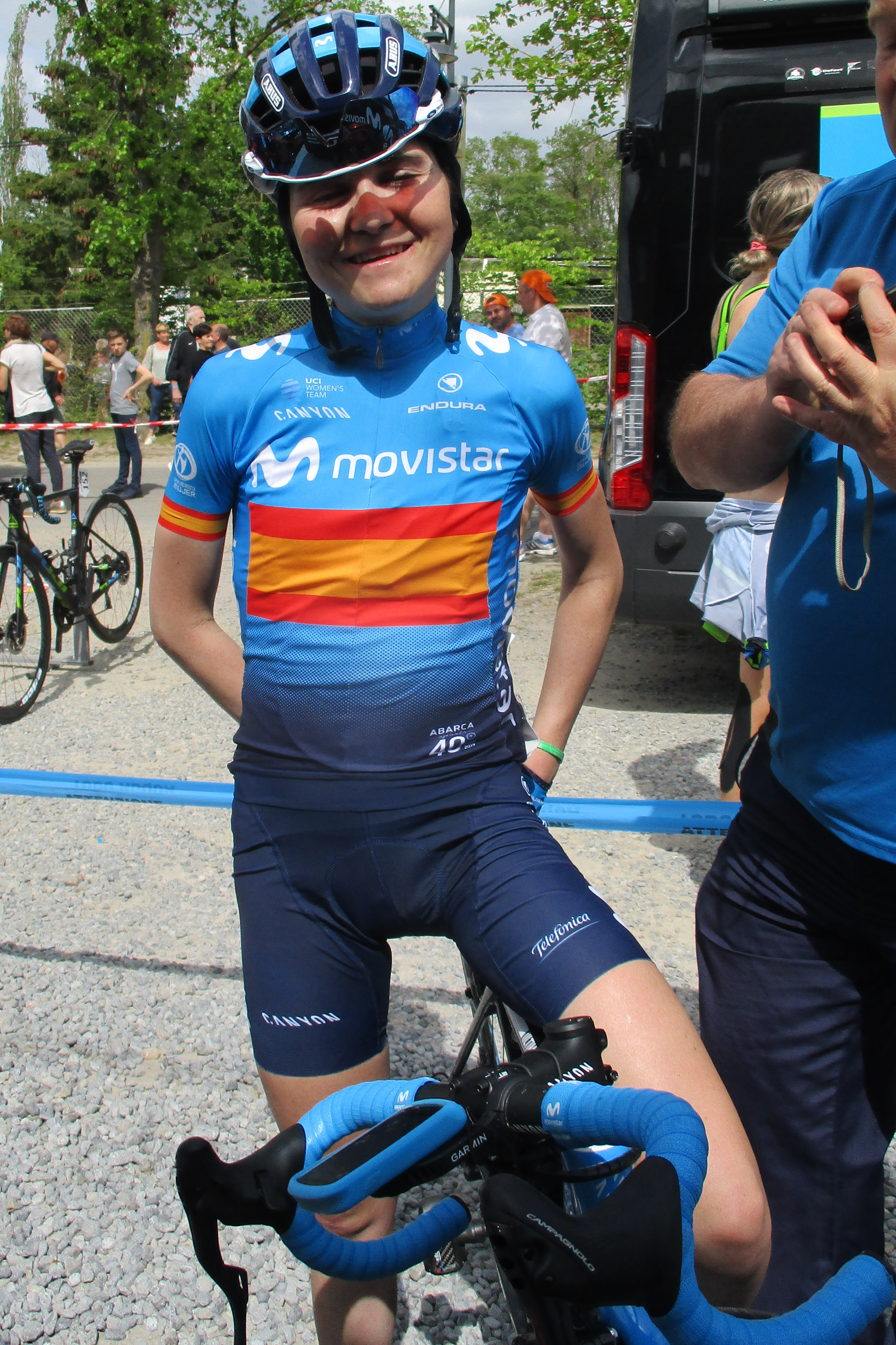 Finish van de Waalse Pijl 2019 voor vrouwen op de Mur de Huy